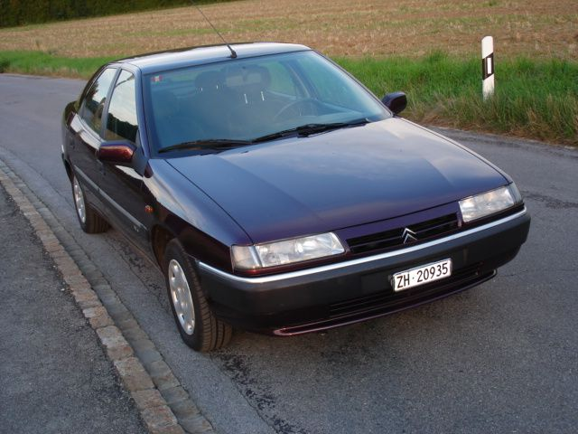 Citroën Xantia 1.8i 16V, 1996